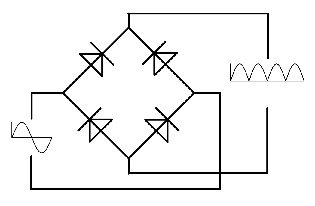 Zapojenie Graetzovho mostíka so zvýraznením priebehov na vstupe a výstupe zapojenia.